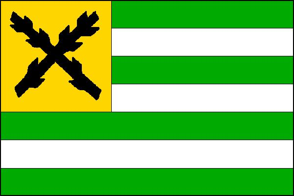 Vlajka obce Jitkov